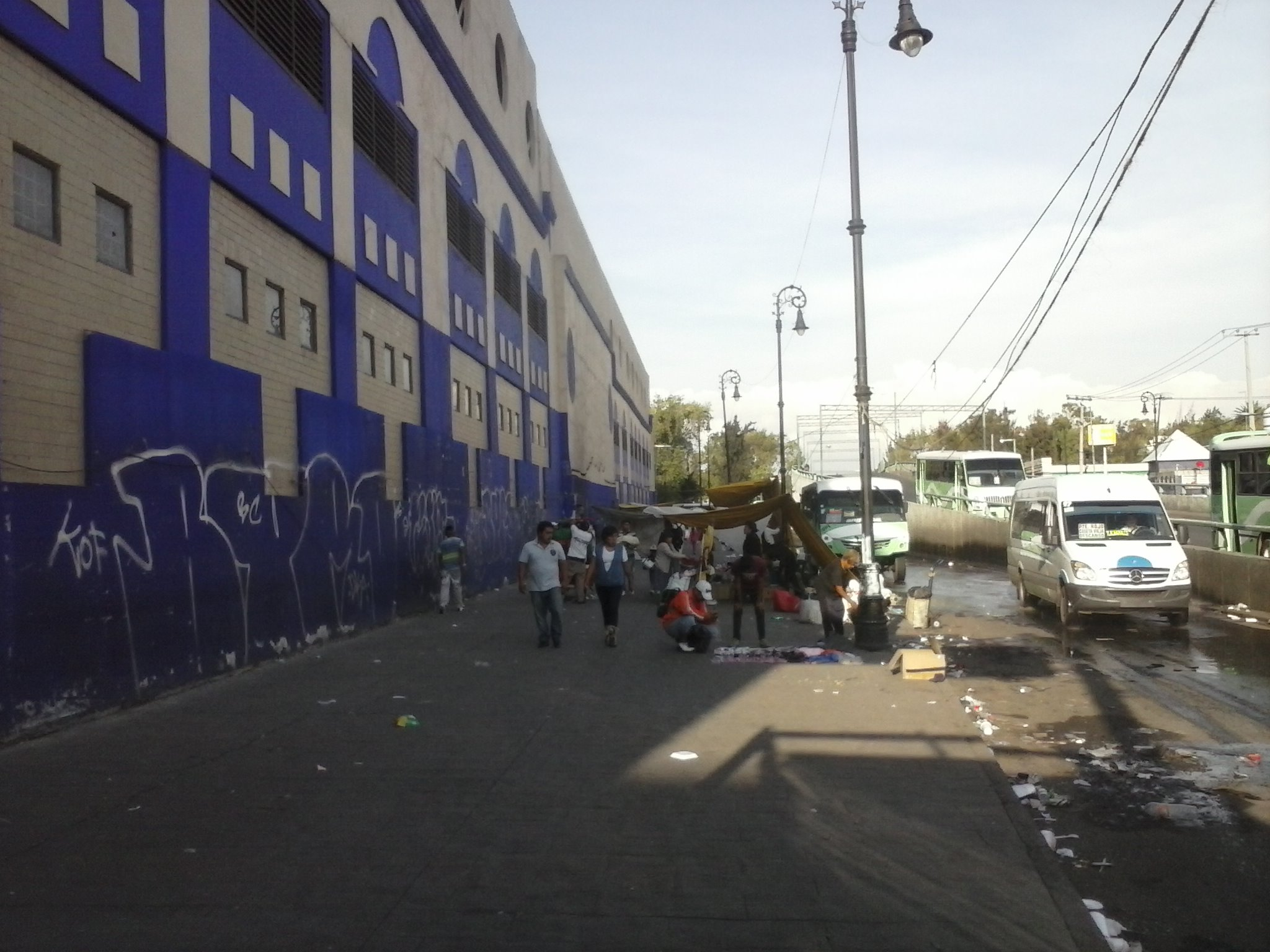 Archivo general de Notarías DF parte trasera